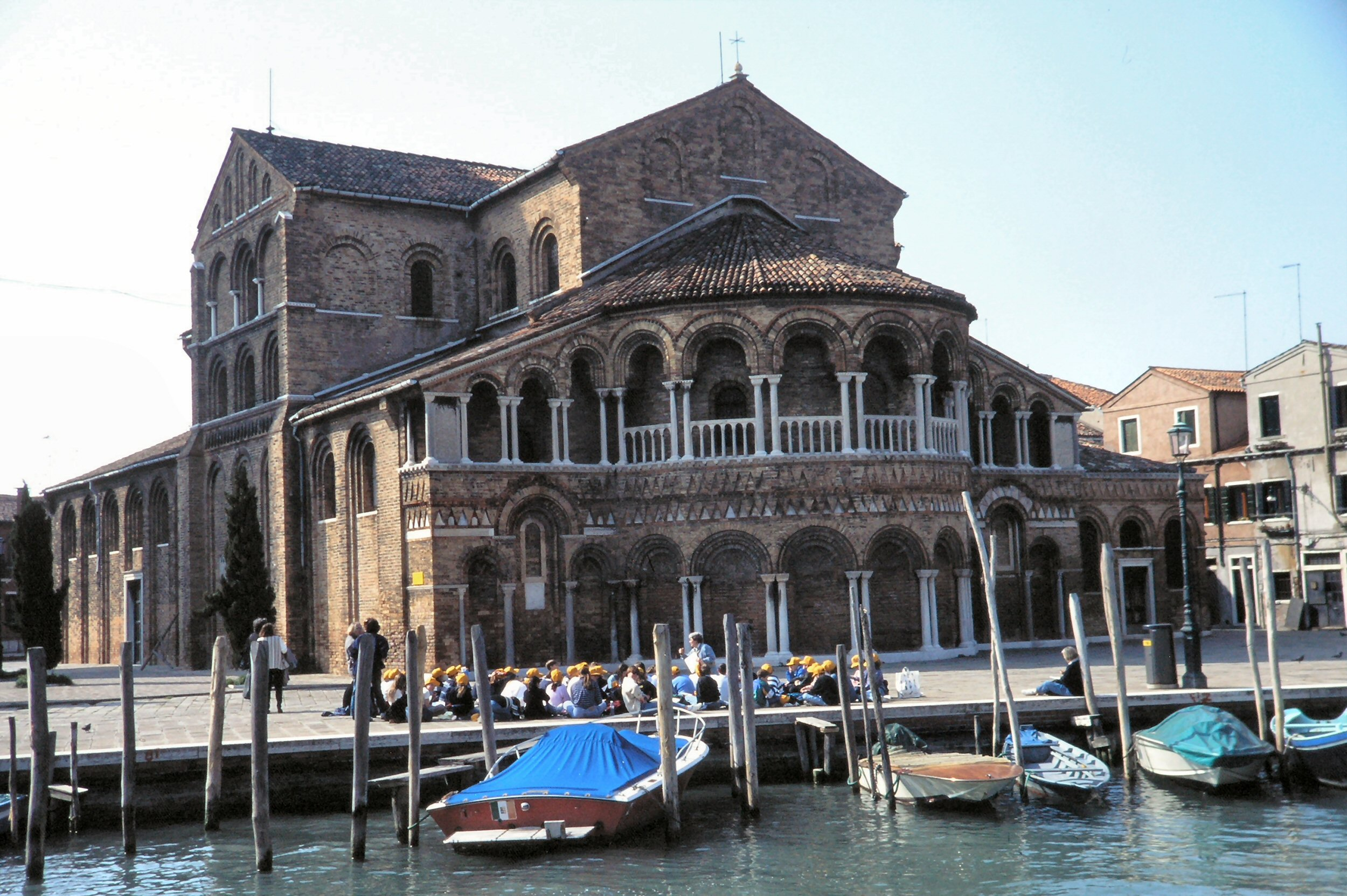 Apsis der Basilika Santi Maria e Donato, Murano